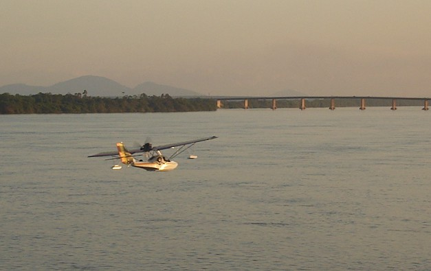 Ultraleve sobre o Rio Branco, Roraima, Brasil.